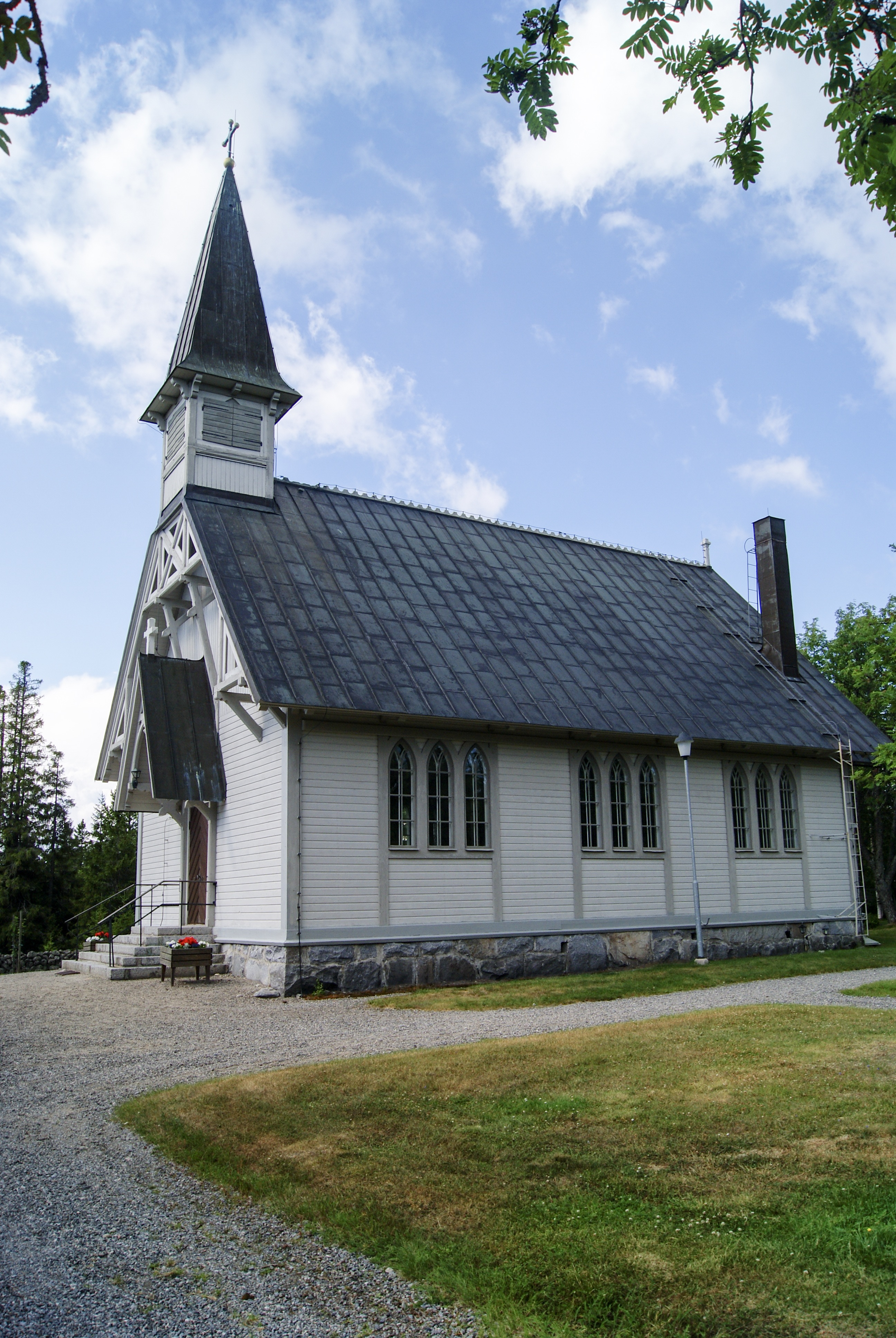 Holmöns kyrka.